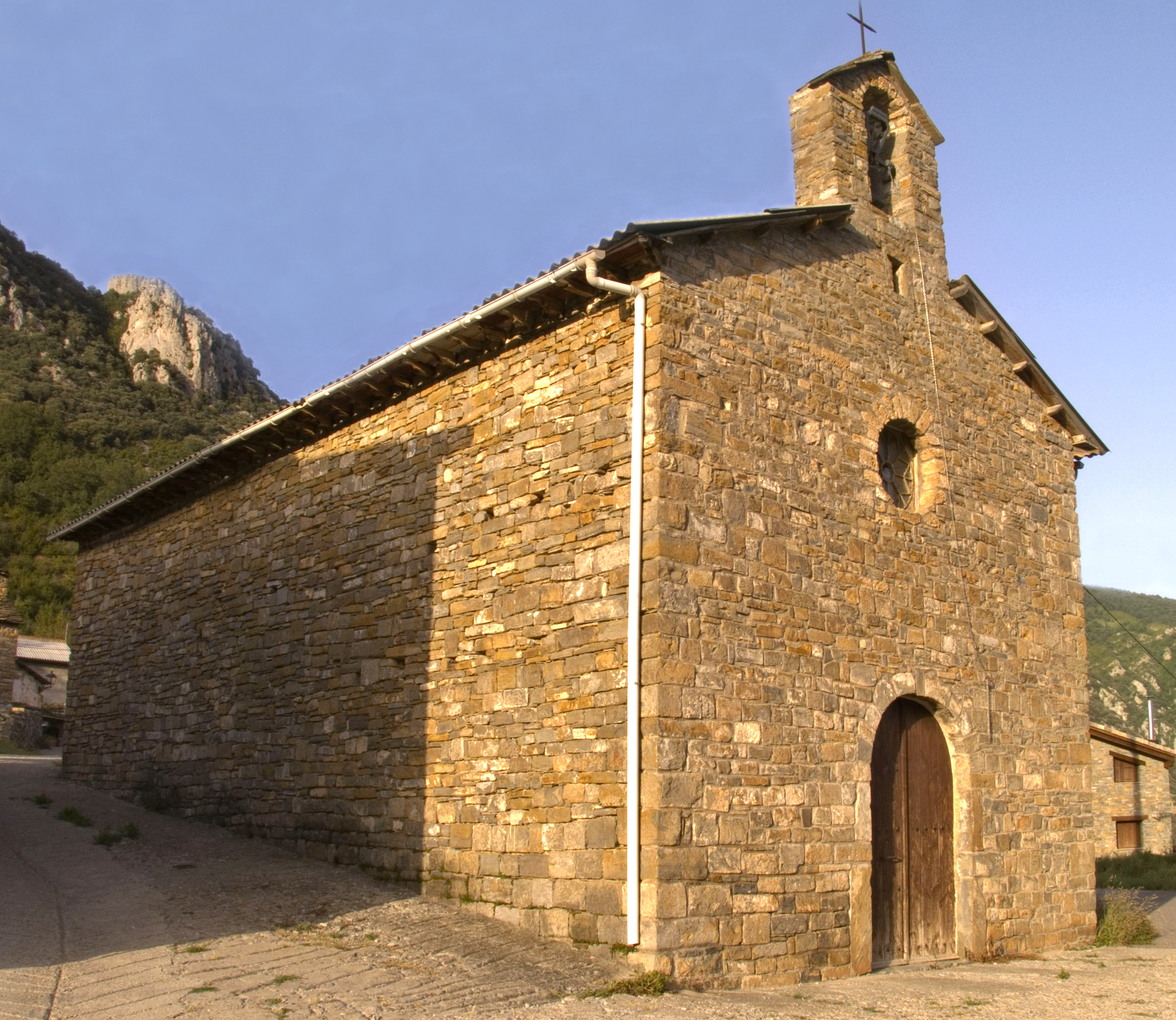 Església parroquial de Sant Esteve, de construcció popular. És del segle XIX. Es van reutilitzar elements d'una construcció romànica, alguns carreus i la pila baptismal. Pertany al municipi de Beranui de la Baixa Ribagorça-Franja de Ponent.